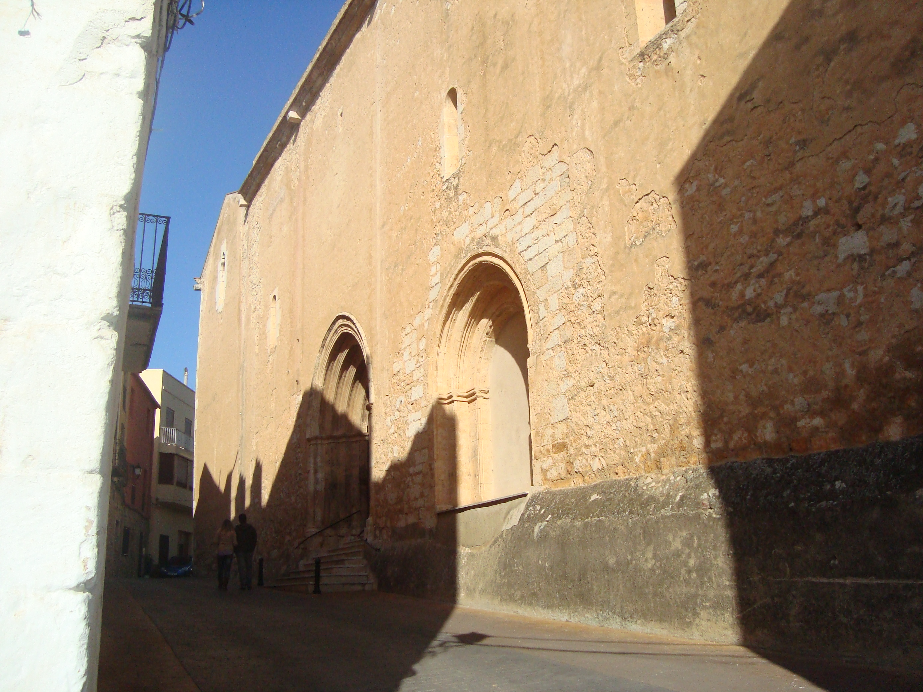 Església parroquial de Miquel Arcàngel (Canet lo Roig) 03.036-002.